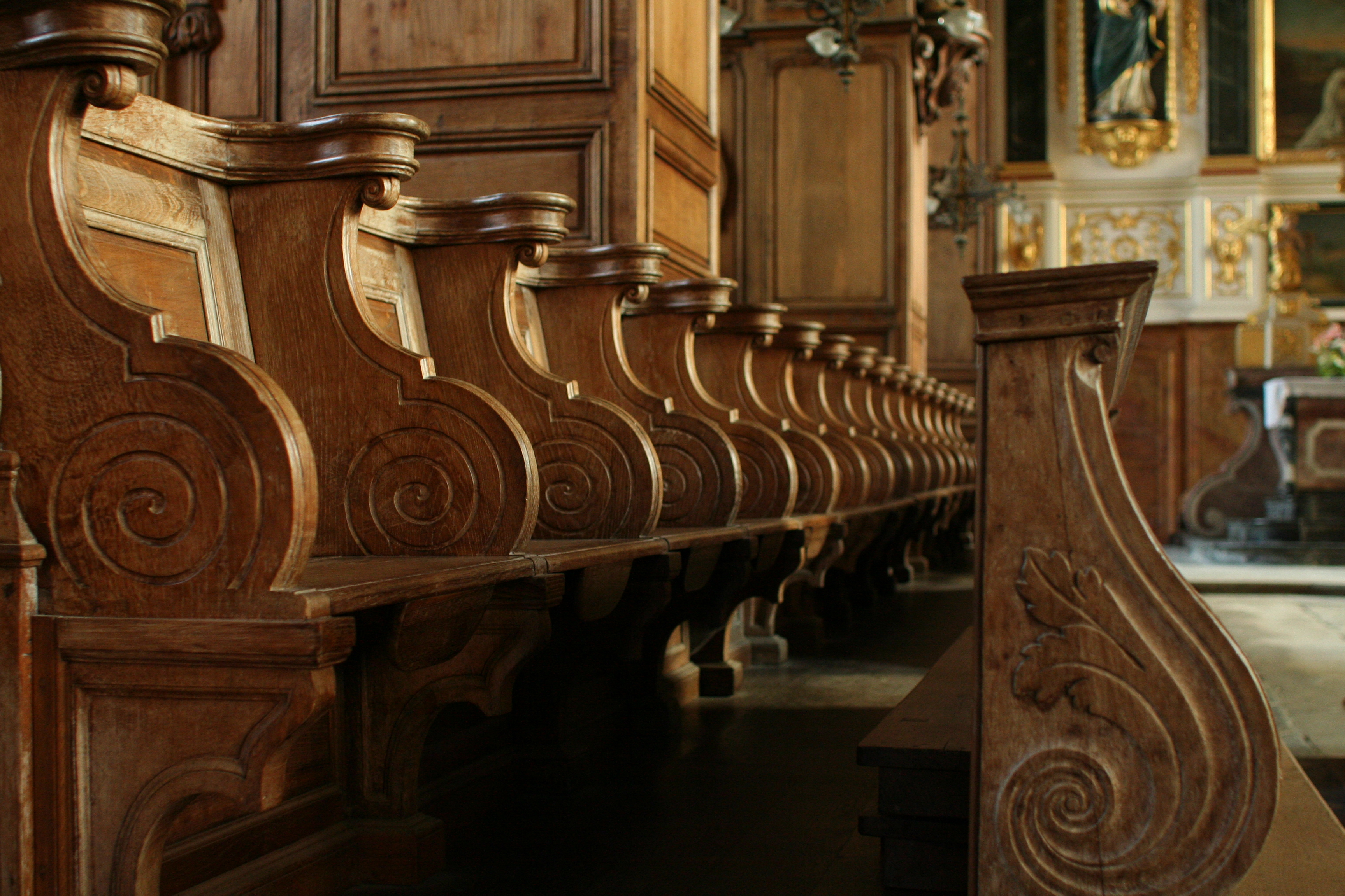 Église Saint-Sulpice de Fougères Stalles XVIIIe siècle, classées monument historique